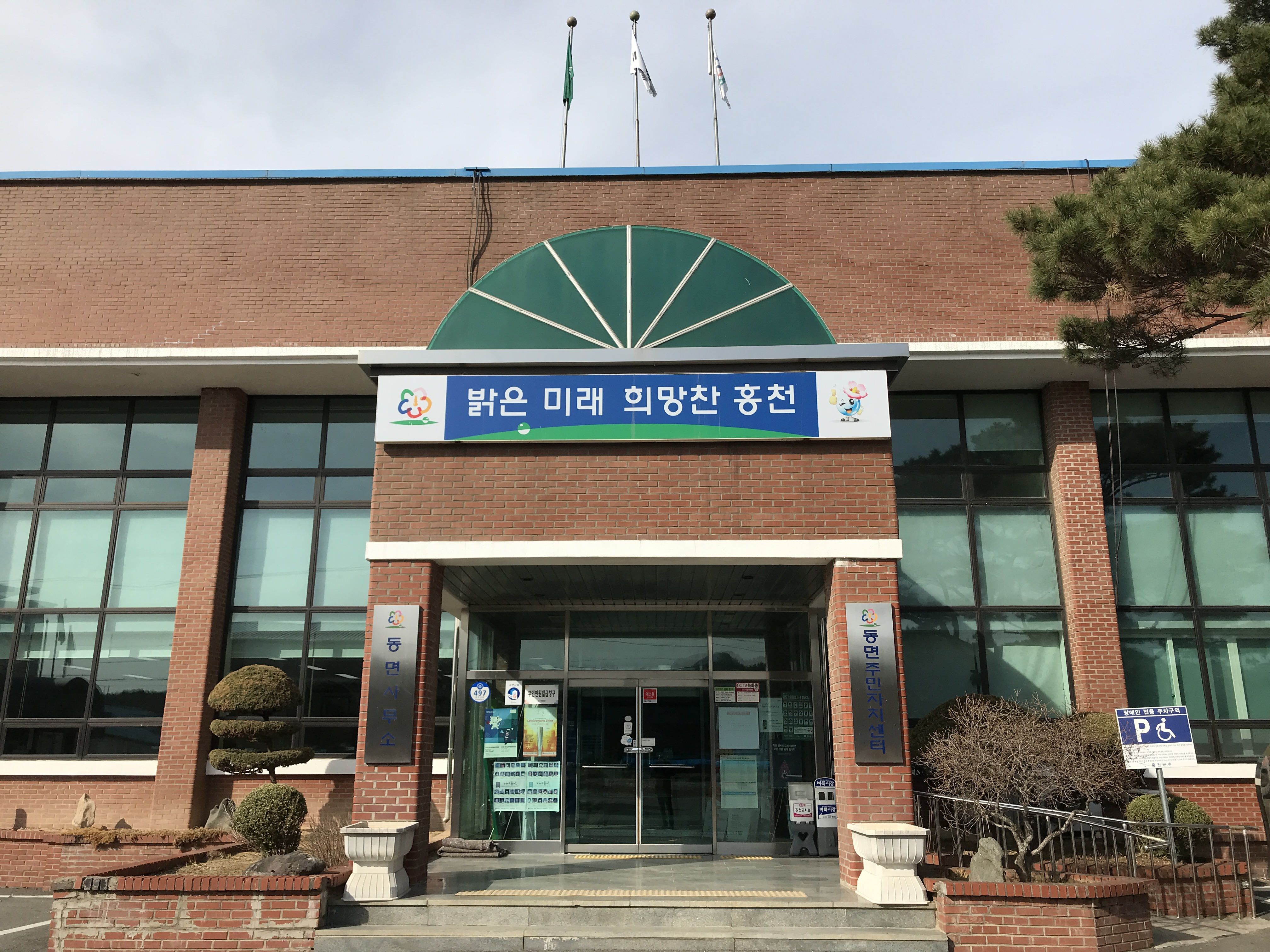 동면사무소(홍천군)